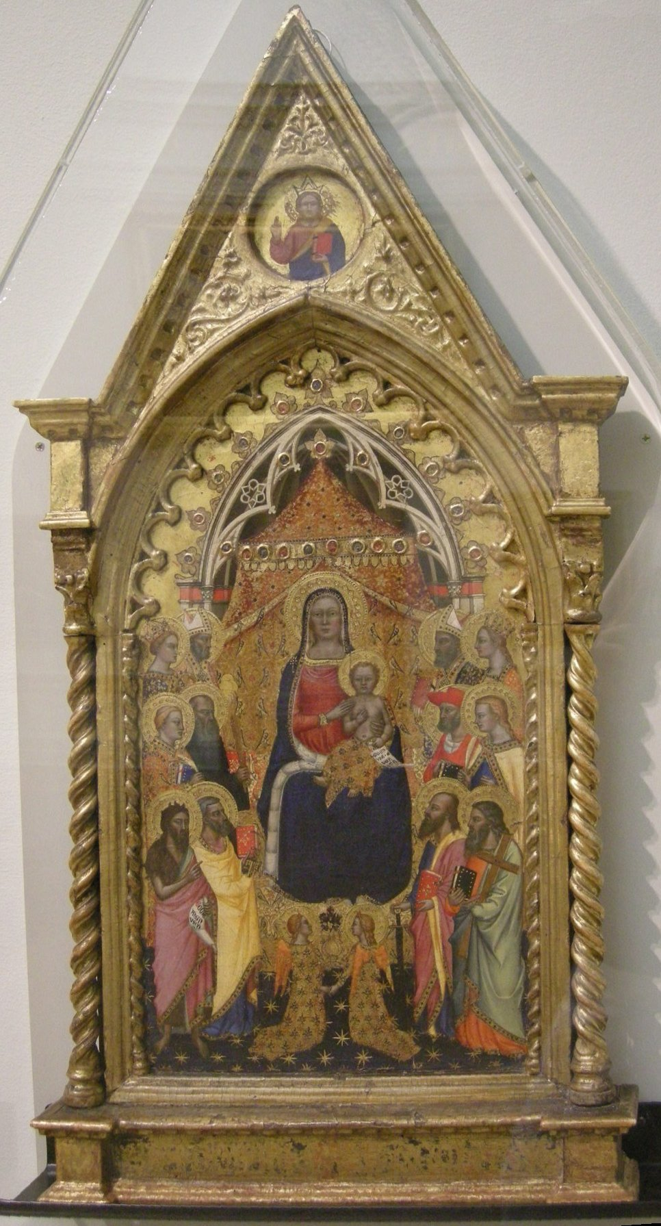 madonna in trono e santititle QS:P1476,it:"madonna in trono e santi" label QS:Lit,"madonna in trono e santi"